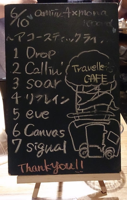 amiinAセトリボード(20180610(1))